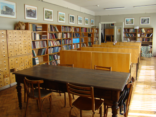 ხელნაწერთა ეროვნული ცენტრის ბიბლიოთეკის სამკითხველო დარბაზი